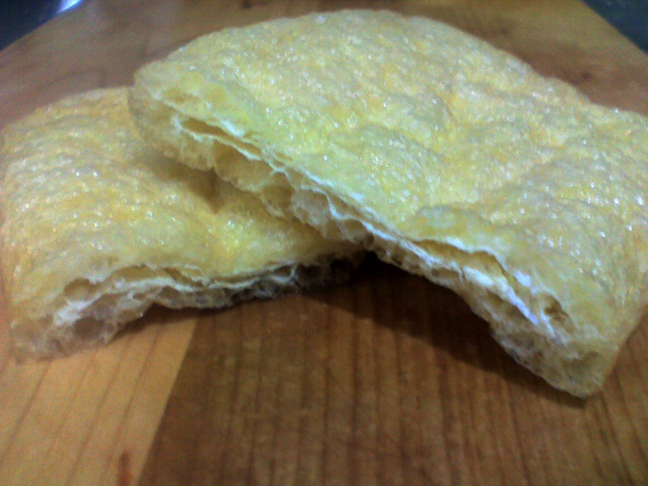 Abura-age(油揚げ)